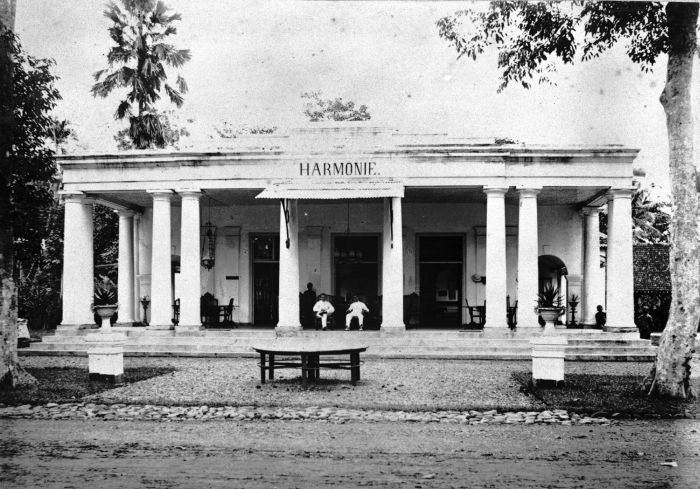 Foto. Twee heren op de veranda van sociëteit de 'Harmonie' te Banjoemas, Midden-Java